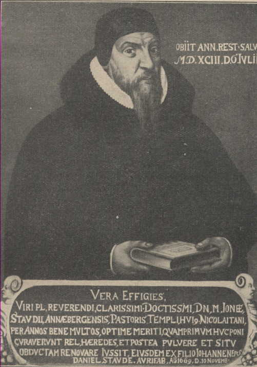 Bild Jonas Staude (1527–1593)